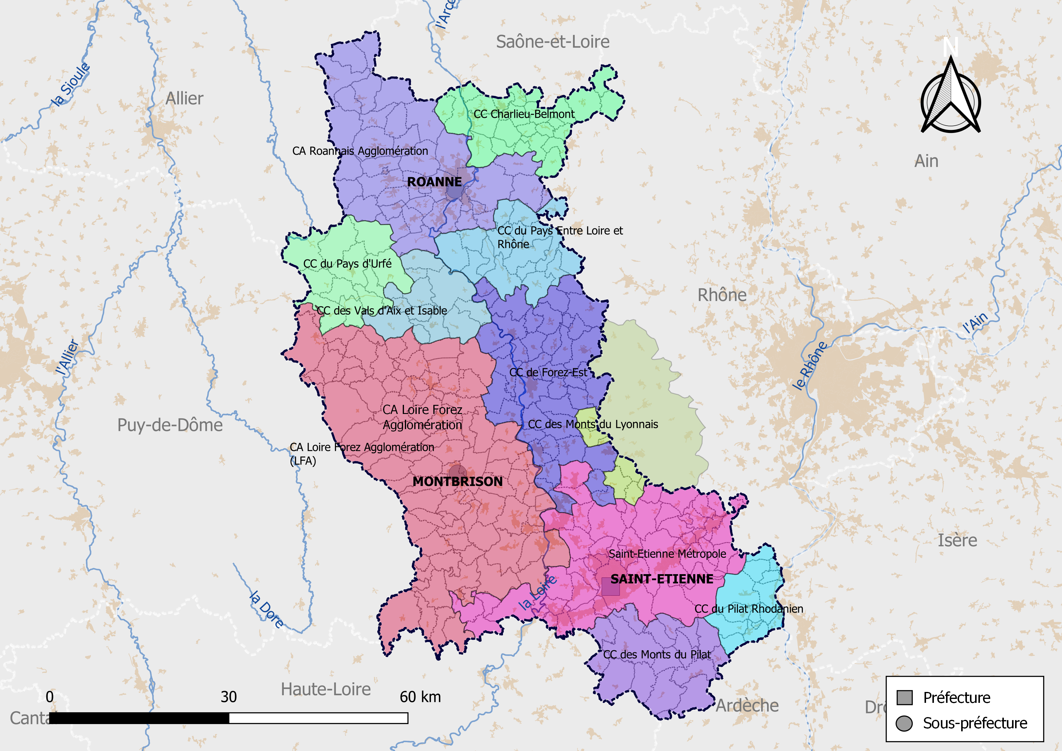 Carte des intercommunalités du département de la Loire, France. Composition au 1er janvier 2019.